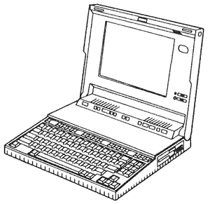 IBM Personal System/2 L40SX